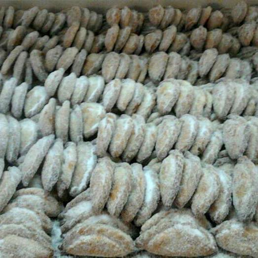 Pastissets de cabell d'àngel, de xocolata, i altres ingredients.